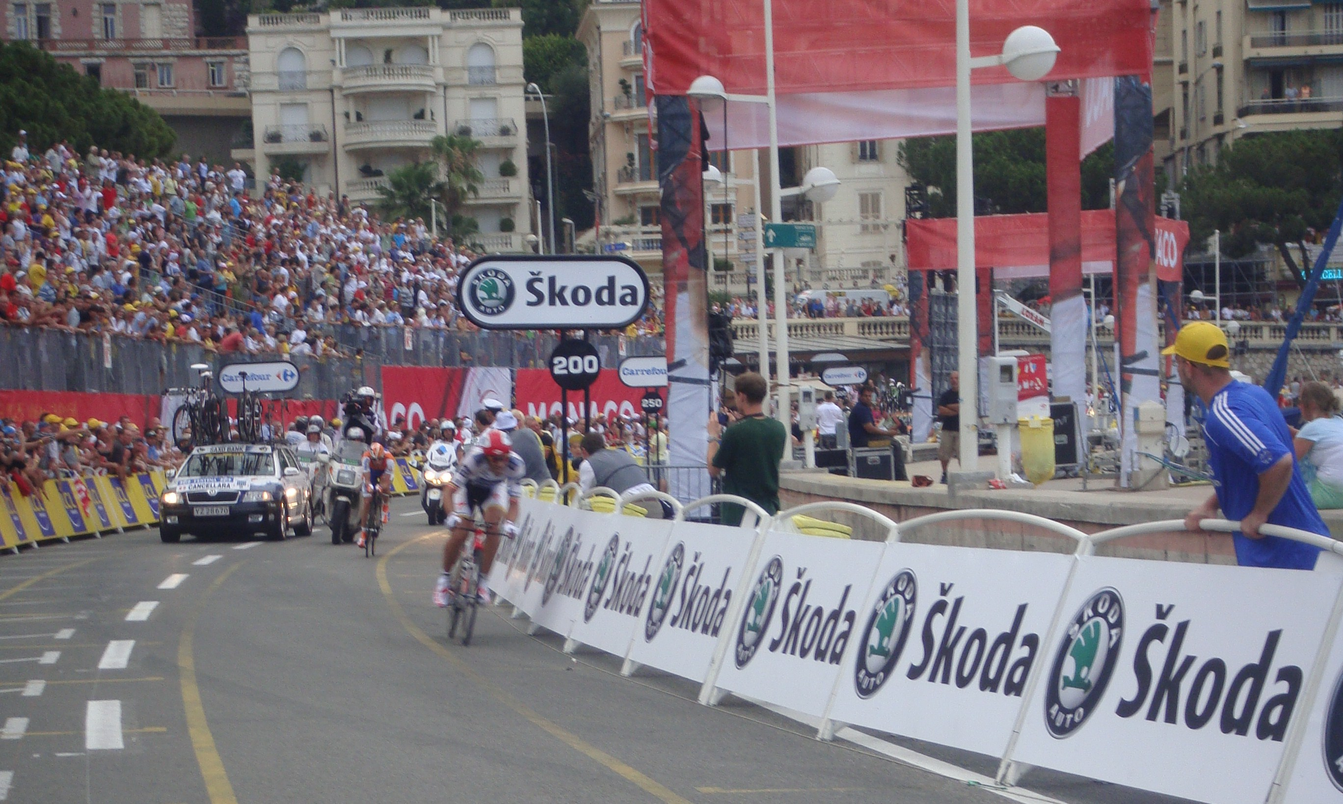 Fabian Cancellara lors du contre-la-montre de la première étape du Tour de France 2009 à Monaco